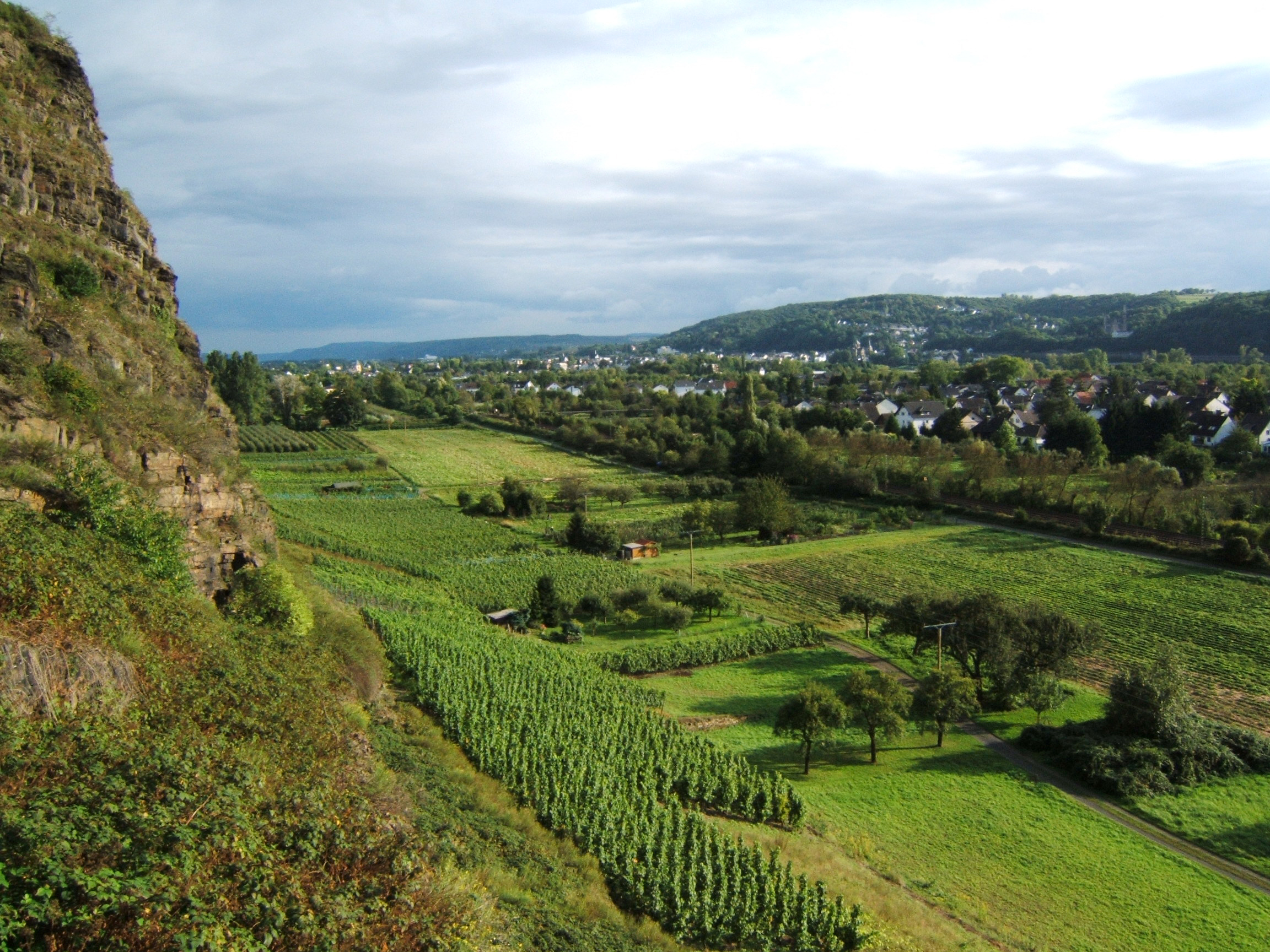 Blick vom Stux auf Unkel-Heister